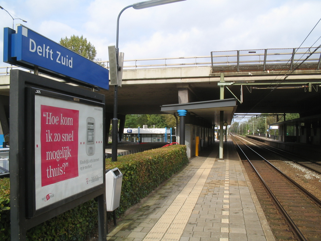 station Delft-Zuid, oktober 2005